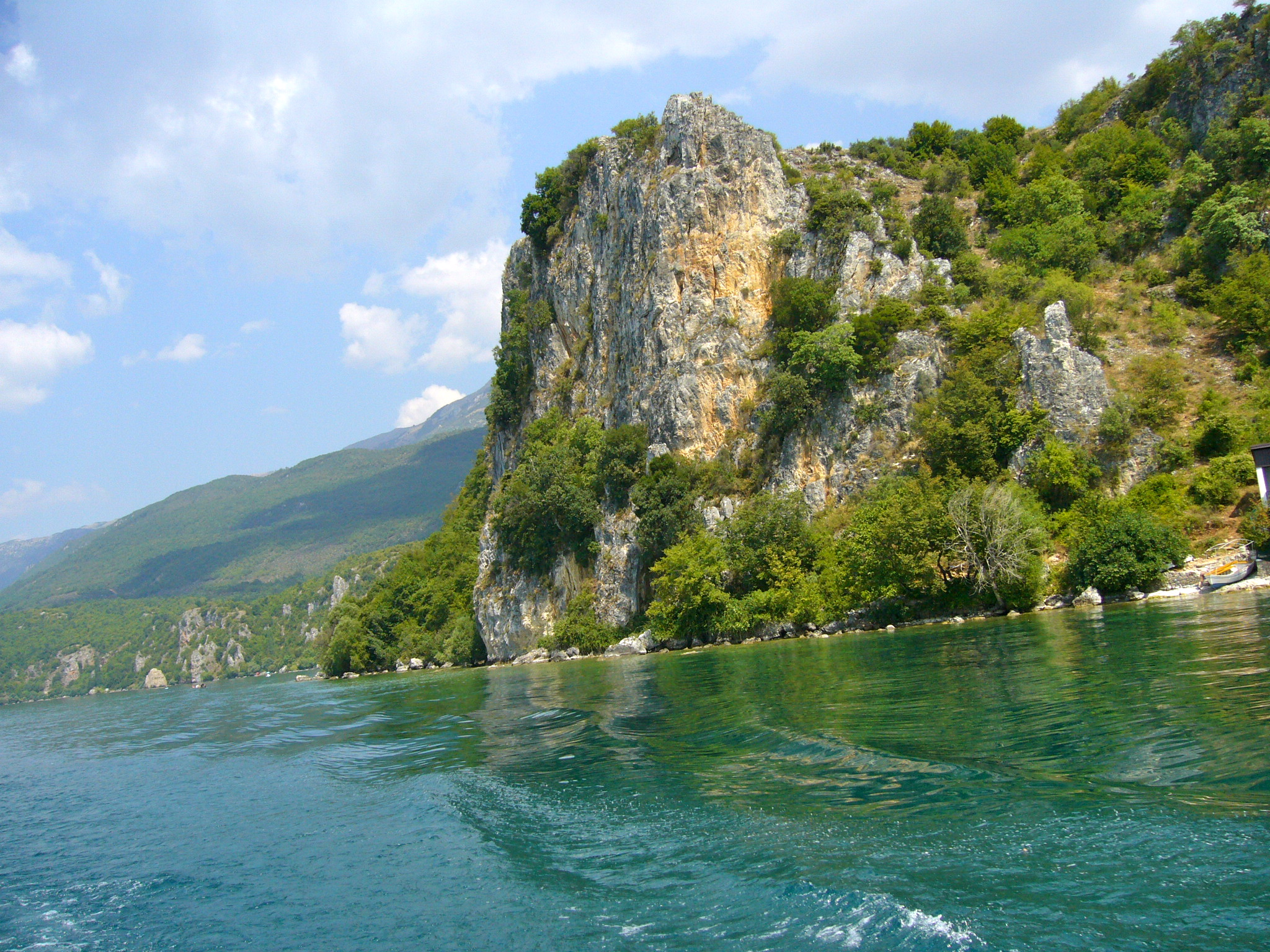 Macedonia